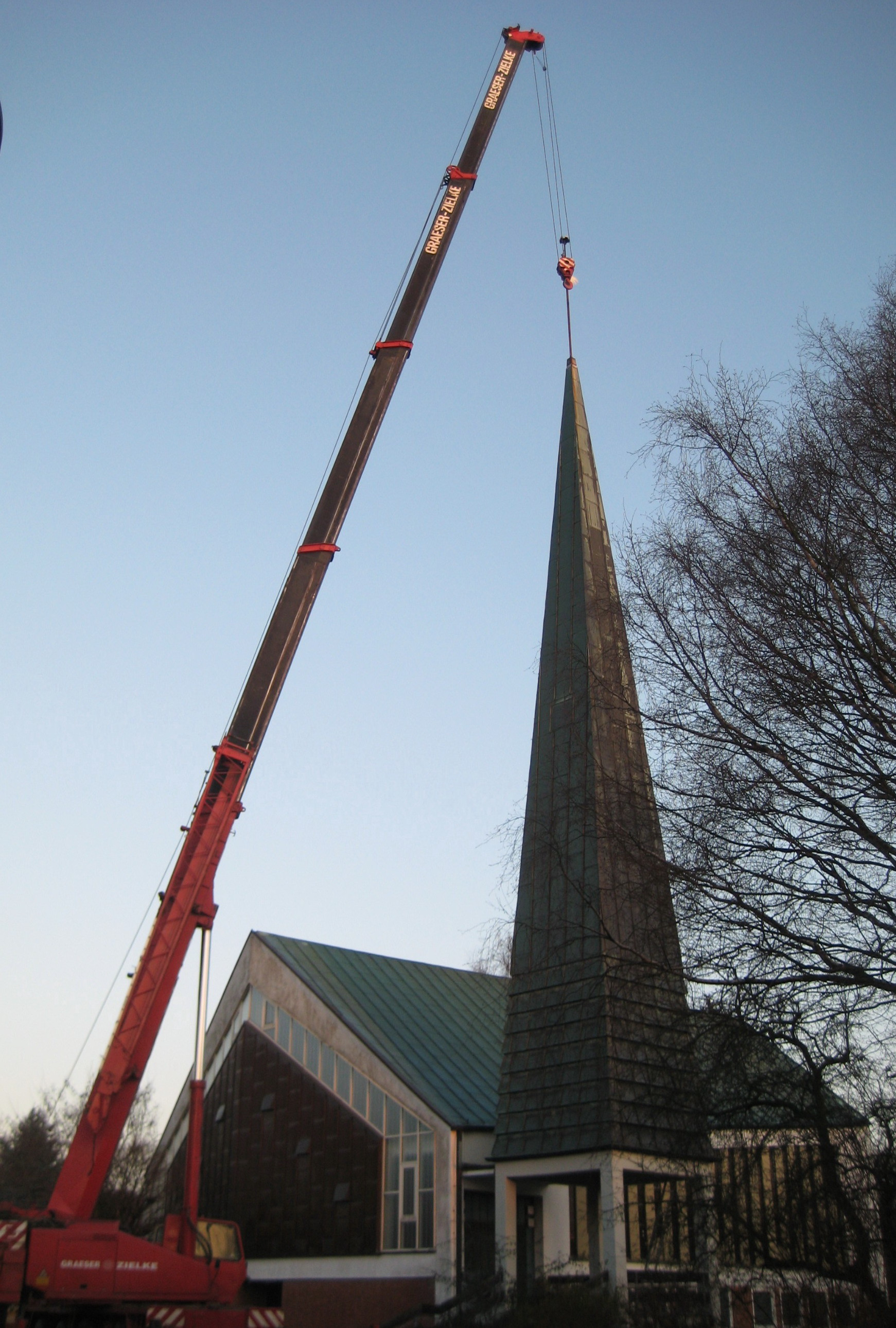 St. Lazarus, Beginn des Turmabtragens